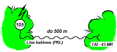 Fernwirk-Betrieb - über leichtes Feldfenkabel LFK-9 bis 500m – einer abgesetzten Funkstellen R-109, in der Betriebsart Fernbedienung.